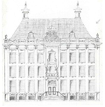 Ontwerptekening van het huis van Jan Albert Sichterman aan de Ossenmarkt te Groningen